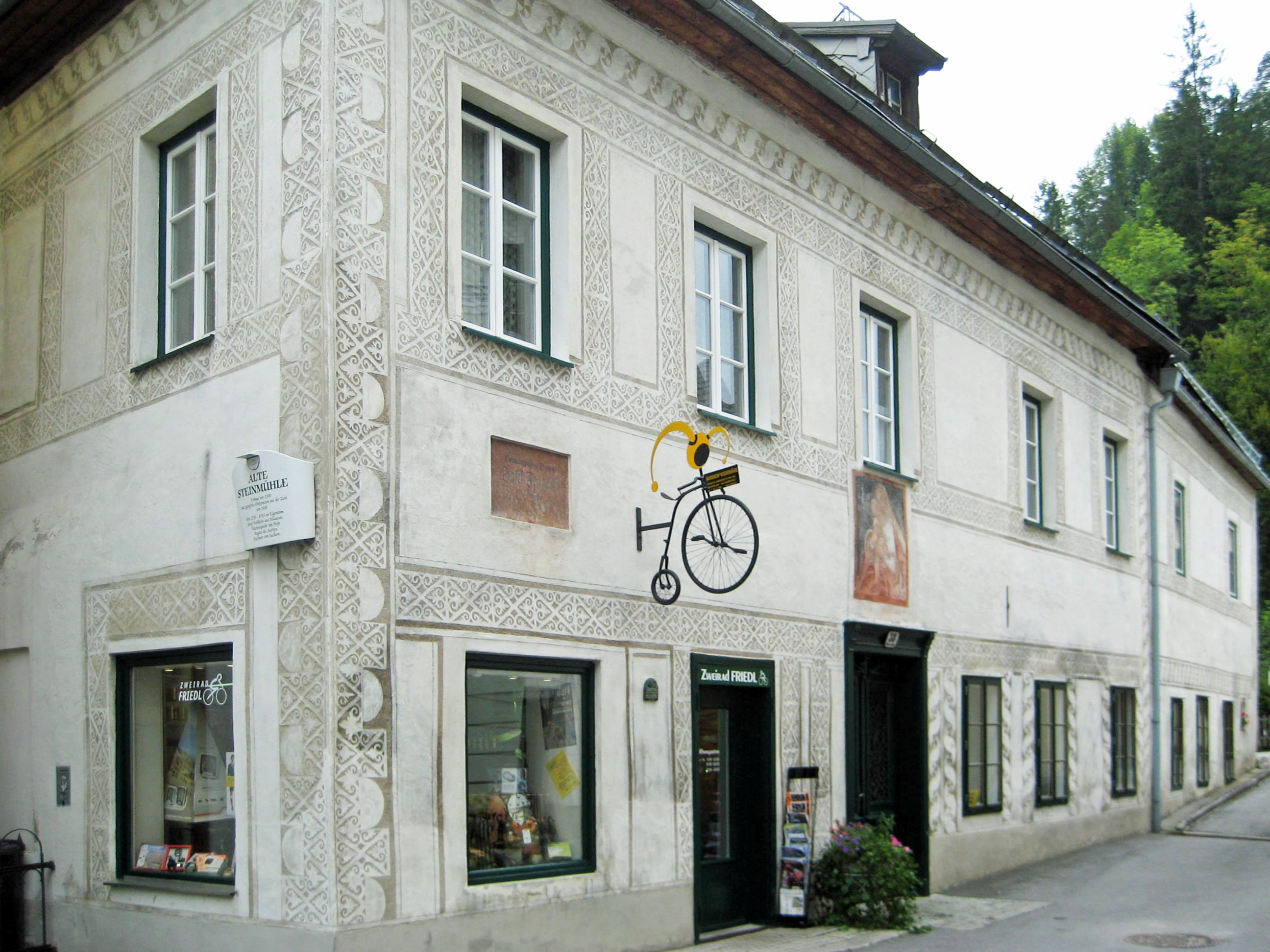 Die Alte Steinmühle in Bad Aussee wurde vor 1500 errichtet. Eine Besonderheit ist die Sgrafitto-Dekoration, die aus der Zeit um 1600 stammt. Von 1735 bis 1753 gehörte das Gebäude Josef Fröhlich, der aus Aussee stammte und Hofnarr am Hof August des Starken, König von Sachsen, in Dresden wurde